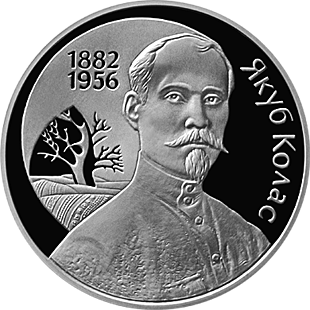 Беларуская (тарашкевіца): Памятная манэта, прысьвечаная 120–годзьдзю з народзінаў Якуба Коласа